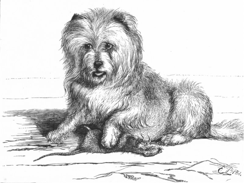 Emma Landseer, verh. McKenzie (1809-1895): Vixen. Holzstich, 1881. 9 x 12 cm